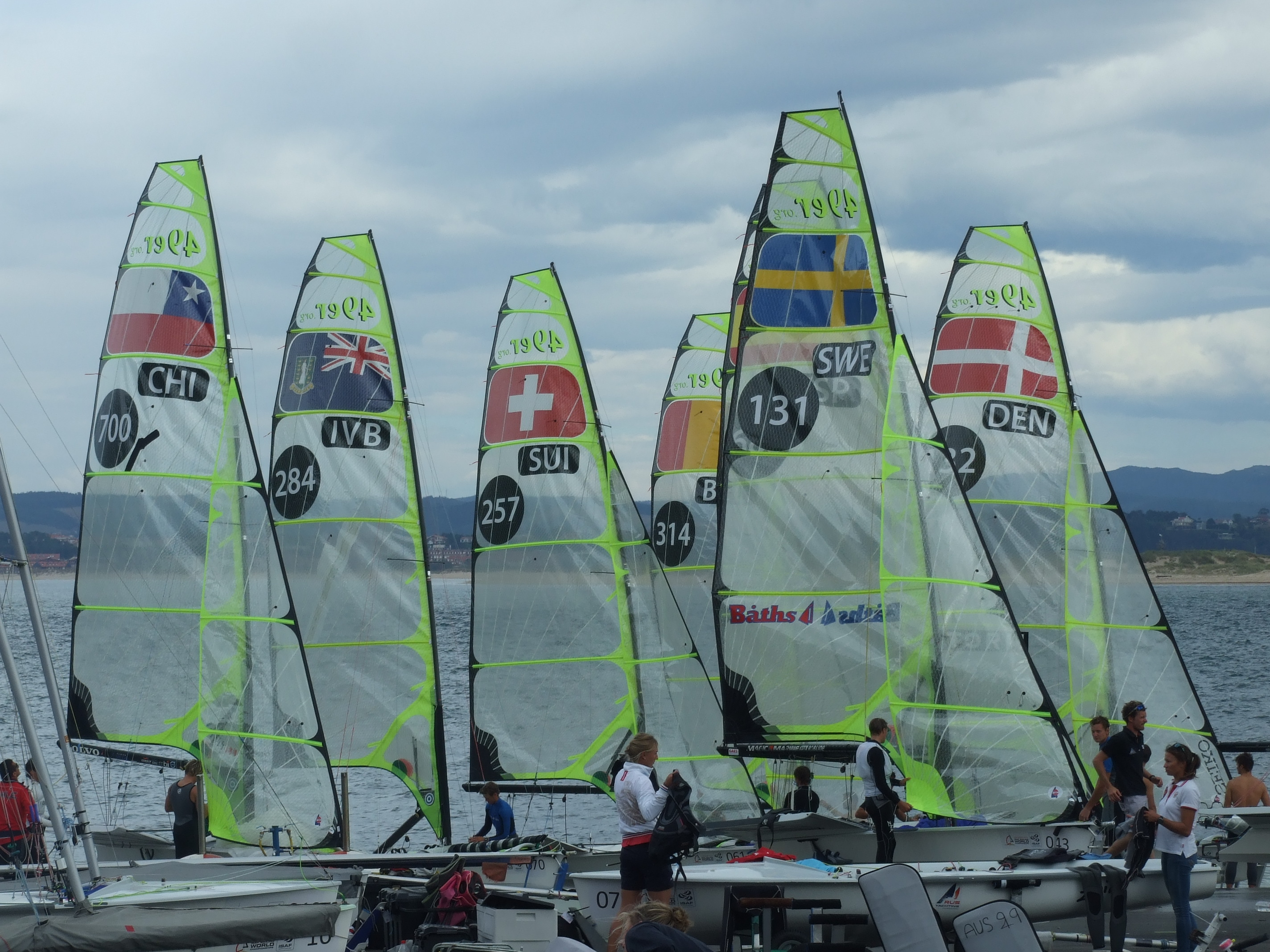 Los 49er en la dársena